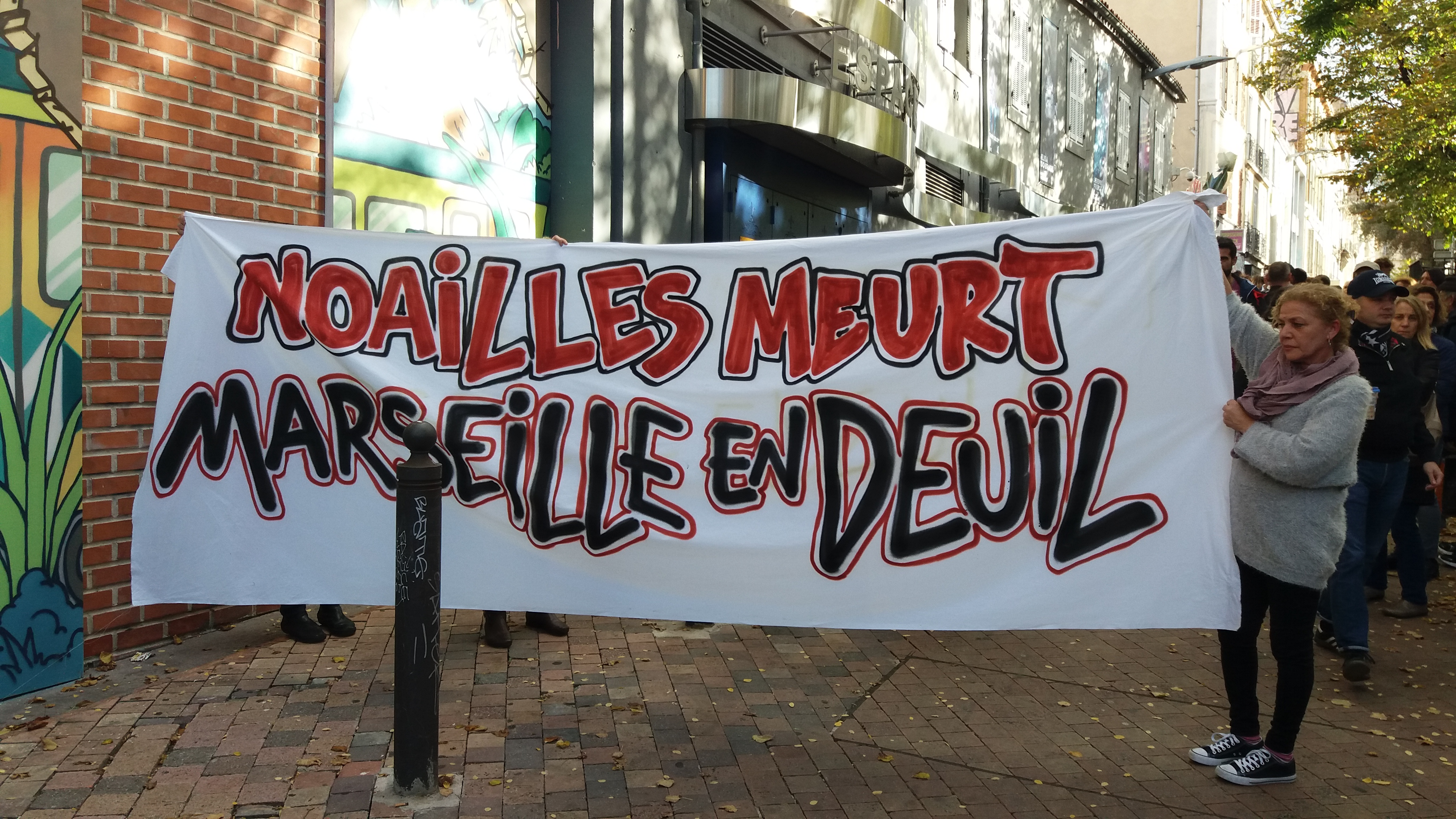 Marche blanche organisée par le collectif « Noailles en colère », suite à l'effondrement des immeubles situés rue d'Aubagne, à Marseille (Bouches-du-Rhône, France)